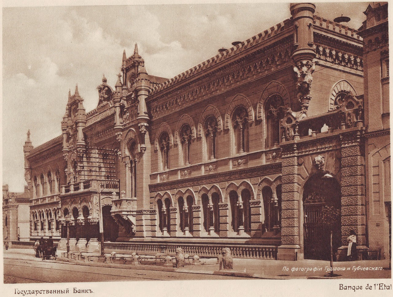 Державний Банк Київ (State bank Kyiv) 1911